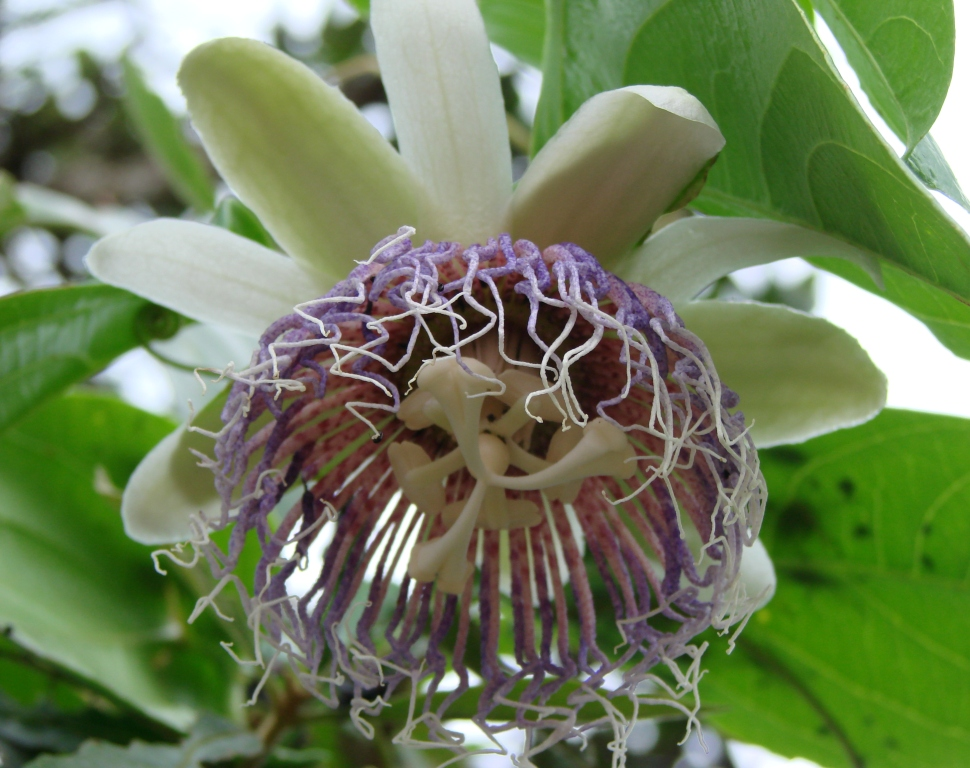 Passiflora nitida - PASSIFLORACEAE Jardim Botânico de Brasília - DF - Brasil